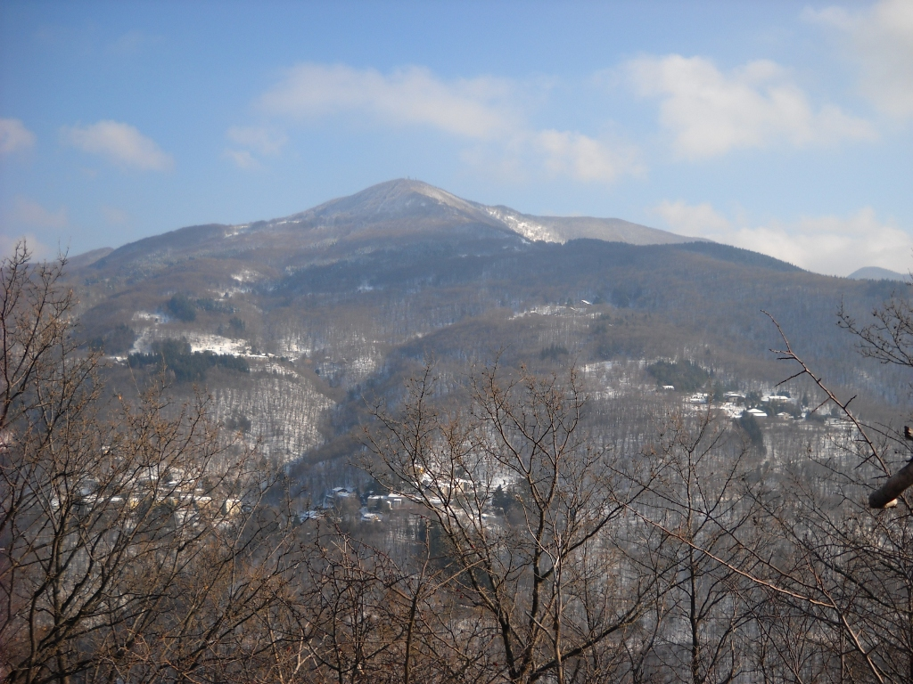 Il M. Pidocchina 1296 m e le borgate di Frassignoni dalla Mulattiera di Granaglione